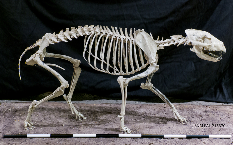 Aelurodon stirtoni skeleton. A fossil canid from Miocene